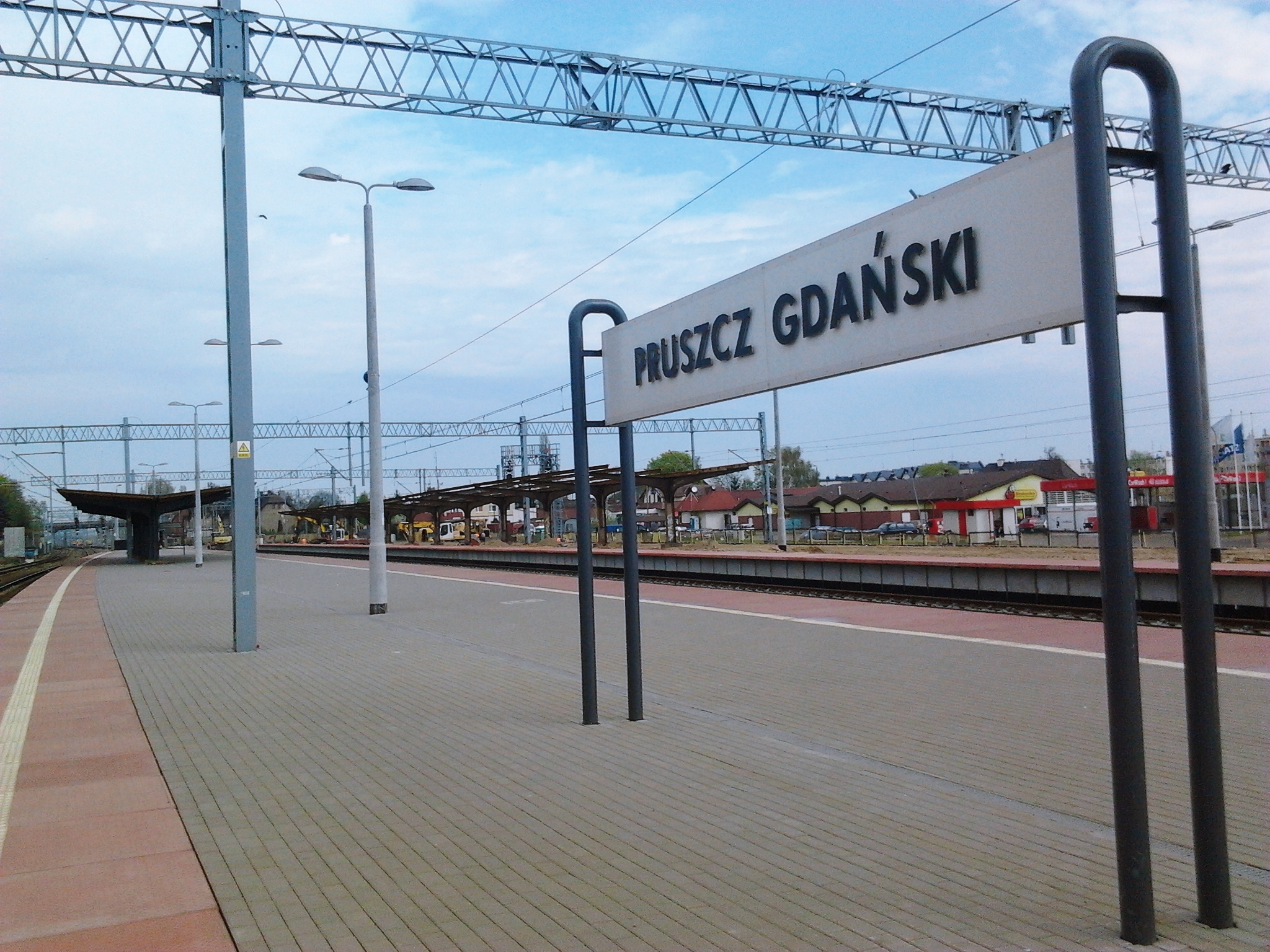 Peron w Pruszczu Gdańskim.